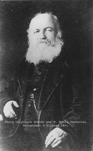 Eliphas Lévi en 1872